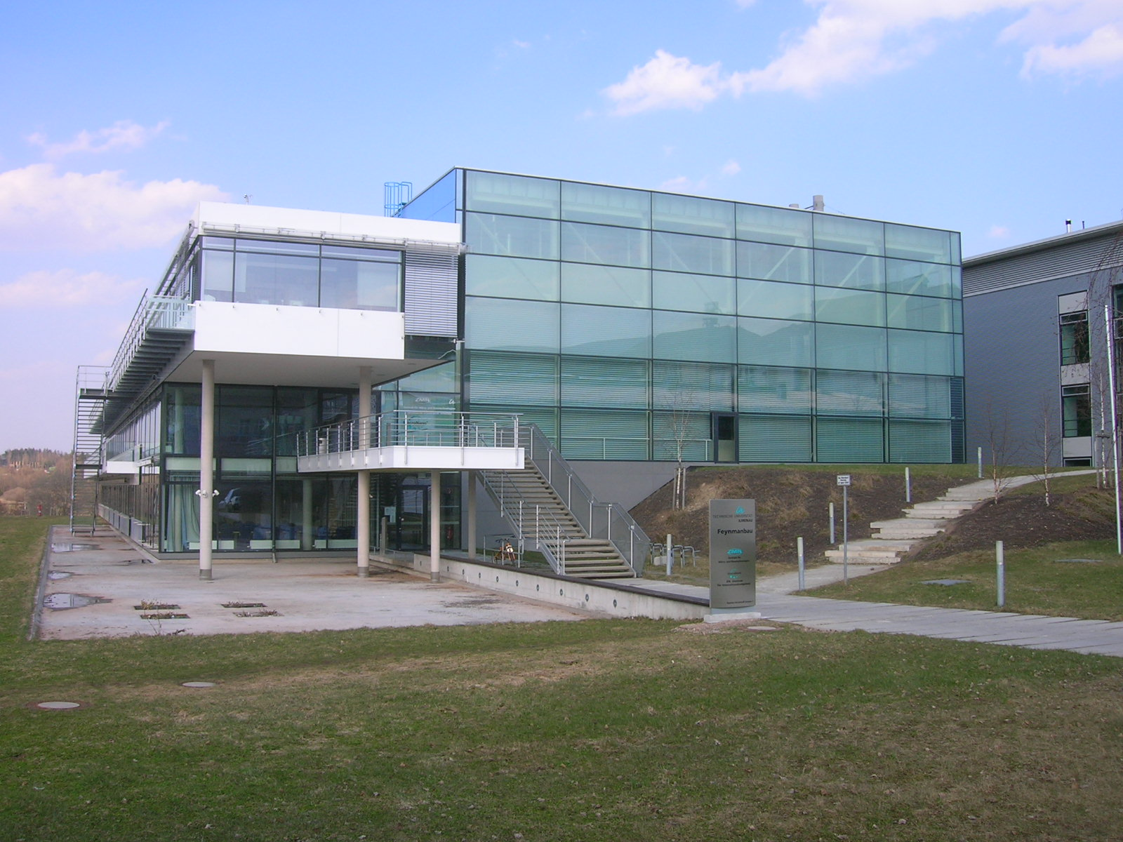 Technische Universität Ilmenau (Thüringen), Feynmanbau